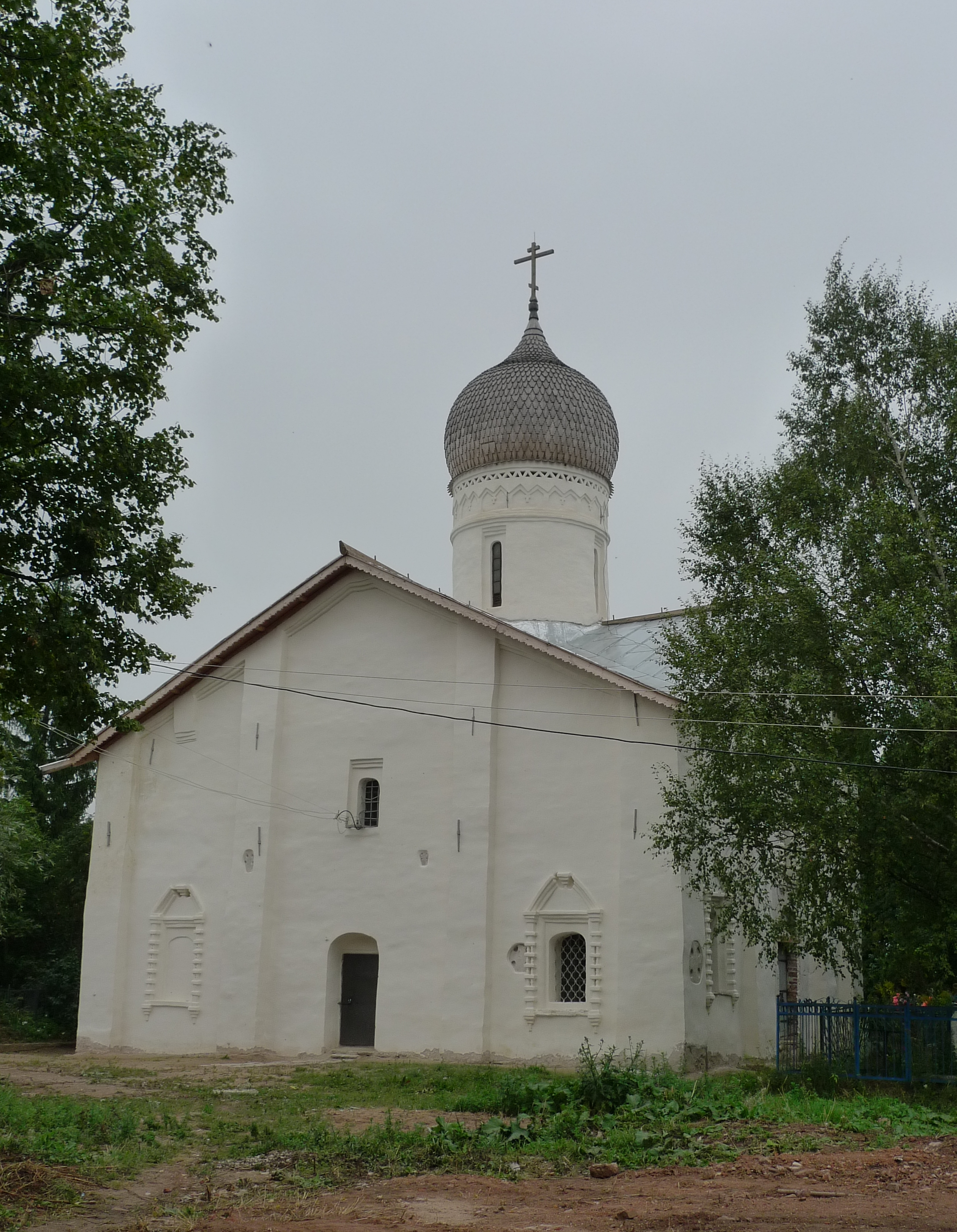 Церковь Благовещения на Мячине озере (Благовещения в Аркажах) (Новгородская область, Великий Новгород, Аркажа (быв. д.))